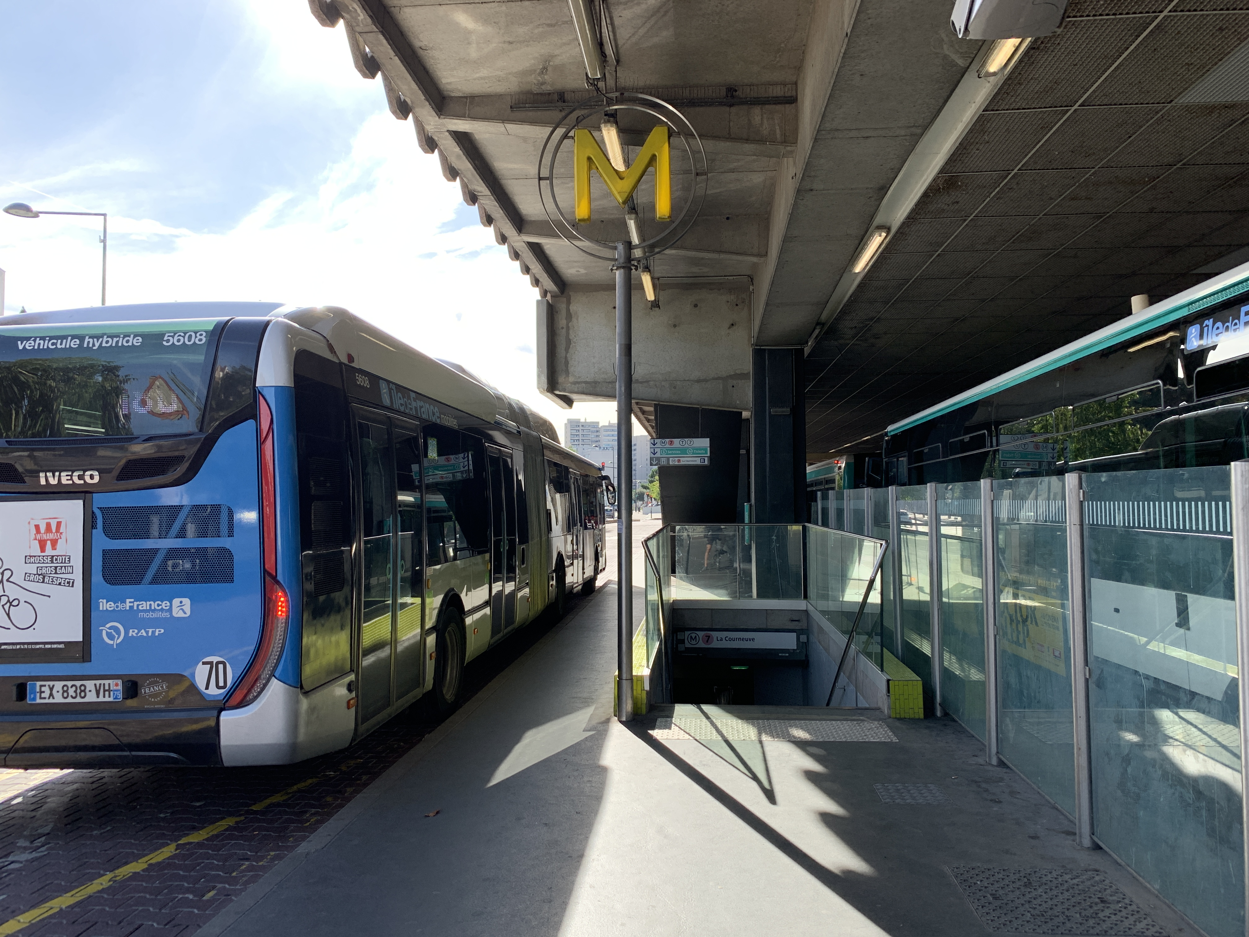 Entrée de la station de métro Villejuif - Louis Aragon, Villejuif.